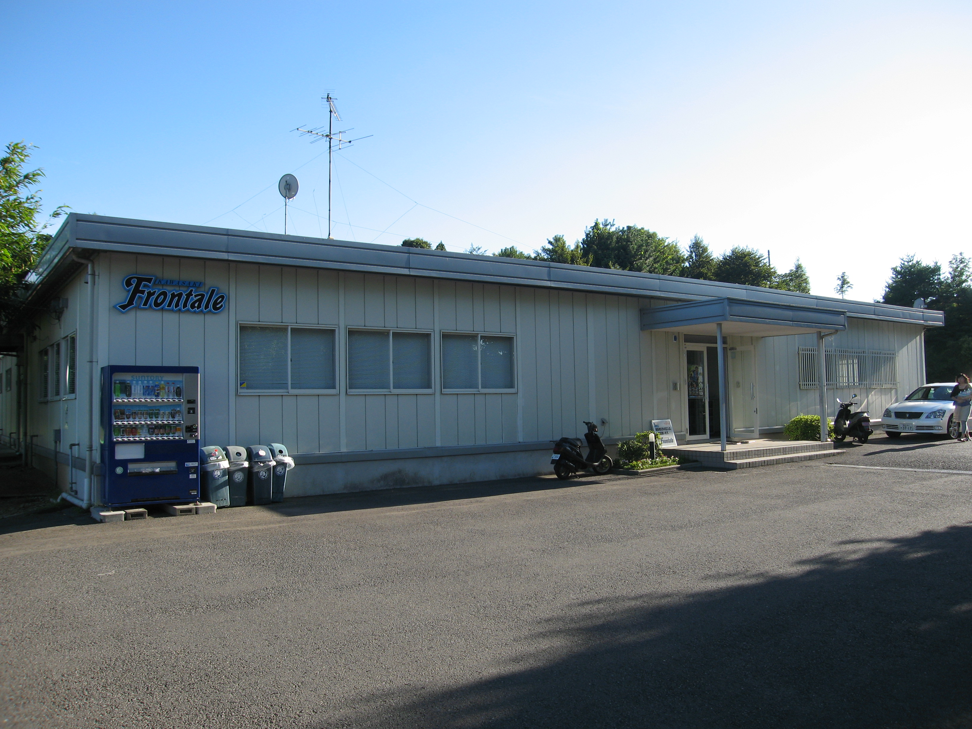 川崎フロンターレ・旧クラブハウス（川崎市麻生区）2007年8月14日撮影